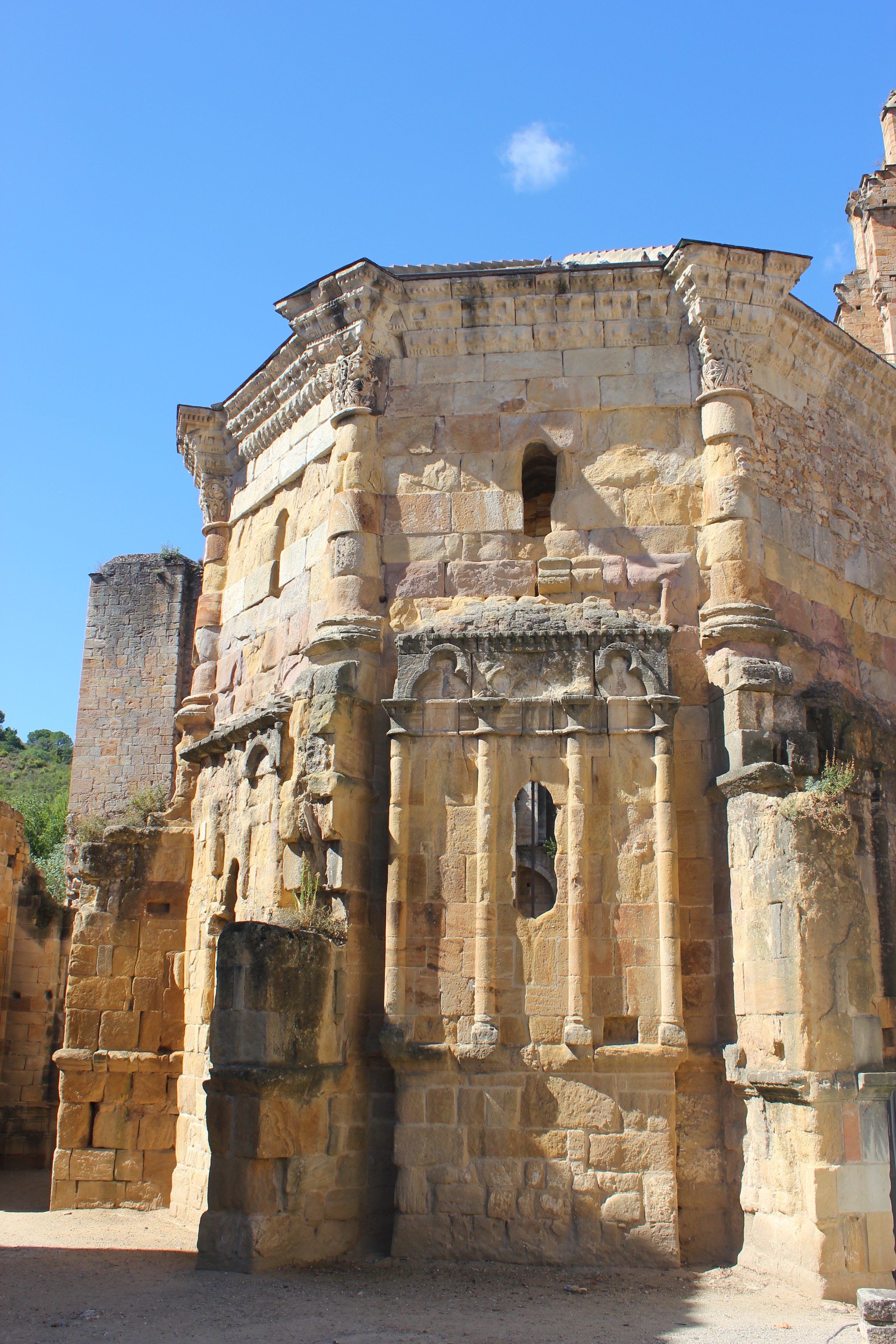 Abbaye d'Alet les bains -(11) France